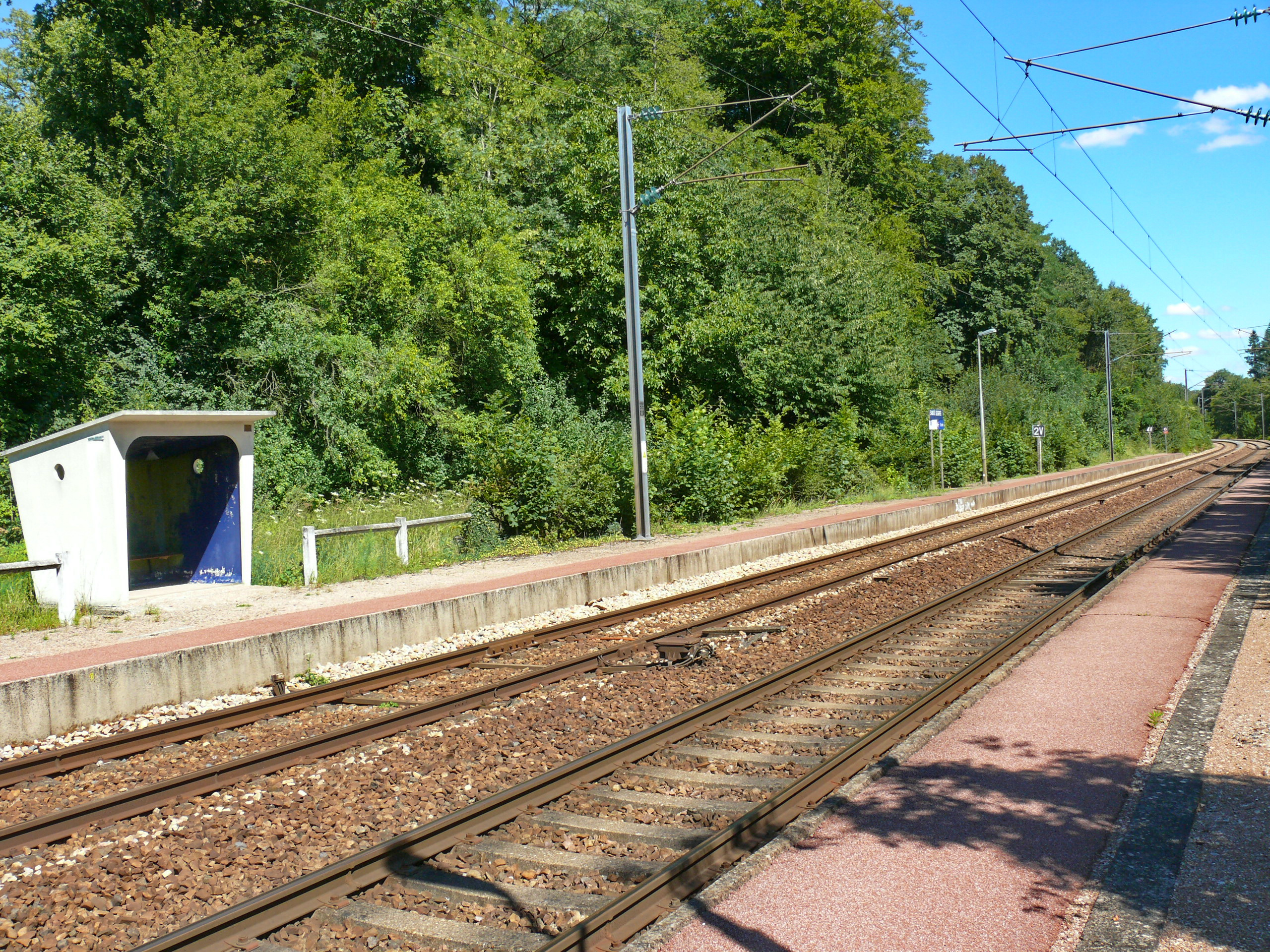 Gare de Sainte-Segrée, sur la ligne Amiens - Rouen